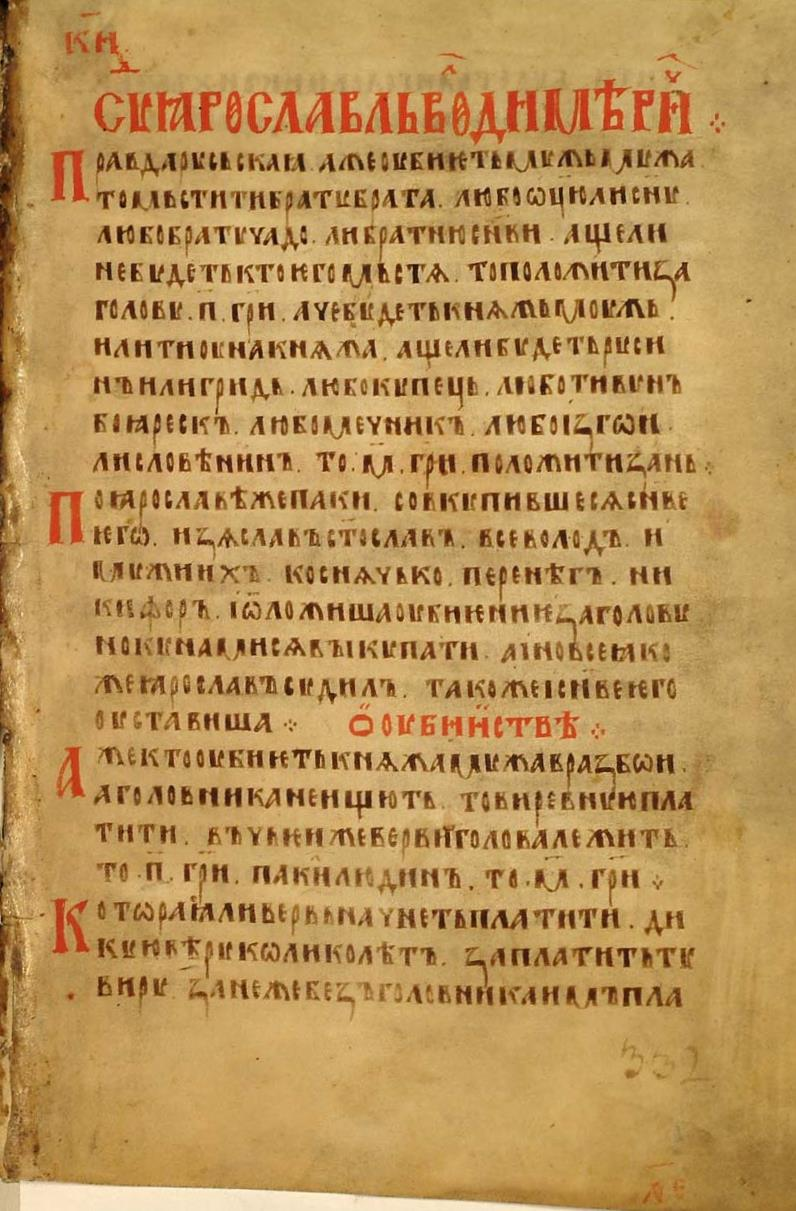 Рукопись № 15. (2026). Мерило праведное, устав. красивый, исх. ХІV века, в четверть, 348 л. Фонд 304.I. Главное собрание библиотеки Троице-Сергиевой лавры. Начало Русской Правды Пространной редакции.